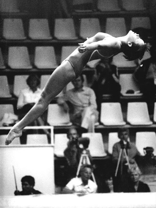 Martina Proeber ADN-ZB Mittelstädt 12-4-82-sk- London: Europapokal im Wasserspringen- mit der ausgezeichneten Punktzahl von 497,85 sicherte sich die 19jährige Rostockerin Martina Proeber (Foto von einem früheren Wettkampf) den Europapokal vom Dreimeterbrett.